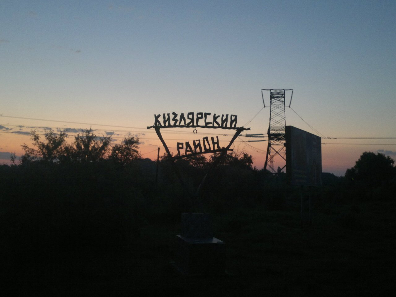 на въезде в Кизлярский район